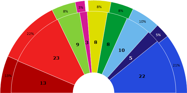 Mandatfördelning i Stockholm Kommunfullmäktige 2014-2018 Från vänster-höger Vänsterpartiet: 13 mandat Socialdemokraterna: 23 mandat Miljöpartiet: 9 mandat Feministiskt Initiativ: 3 mandat Sverigedemokraterna: 8 mandat Centerpartiet: 8 mandat Folkpartiet: 10 mandat Kristdemokraterna: 5 mandat Moderaterna: 22 mandat